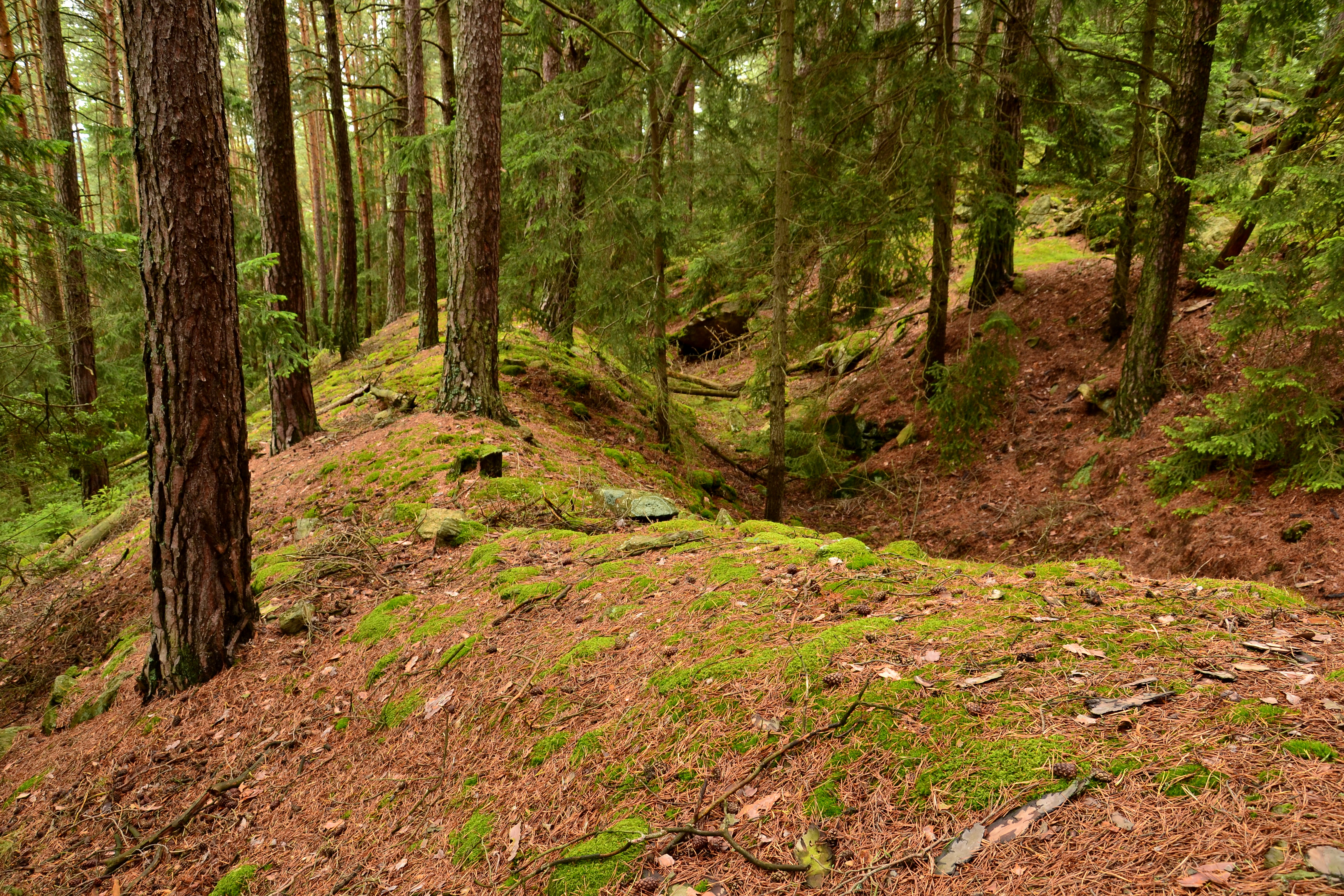 Val a příkop na jižní straně